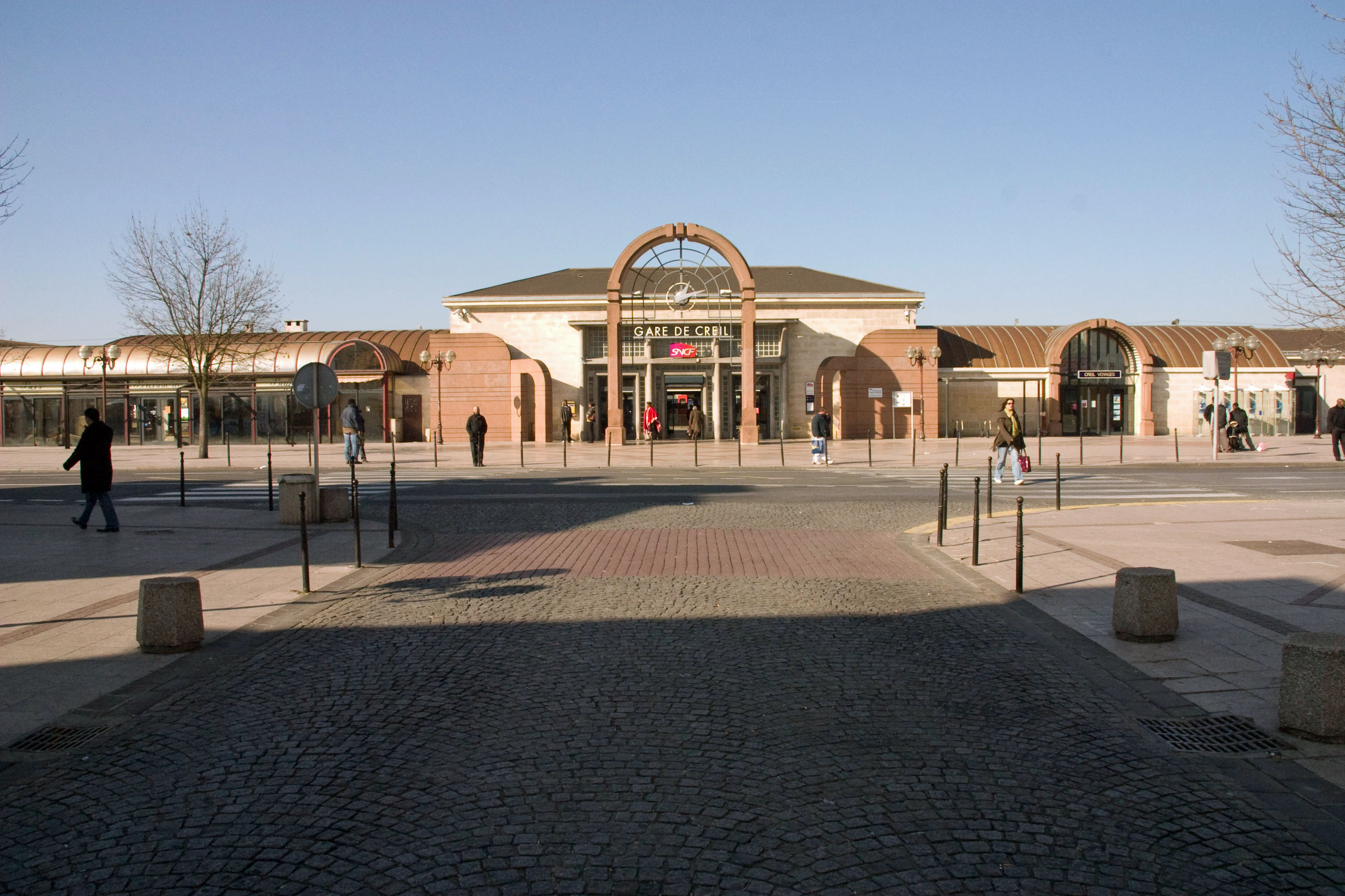 Gare de Creil, Creil, département de l'Oise (France)